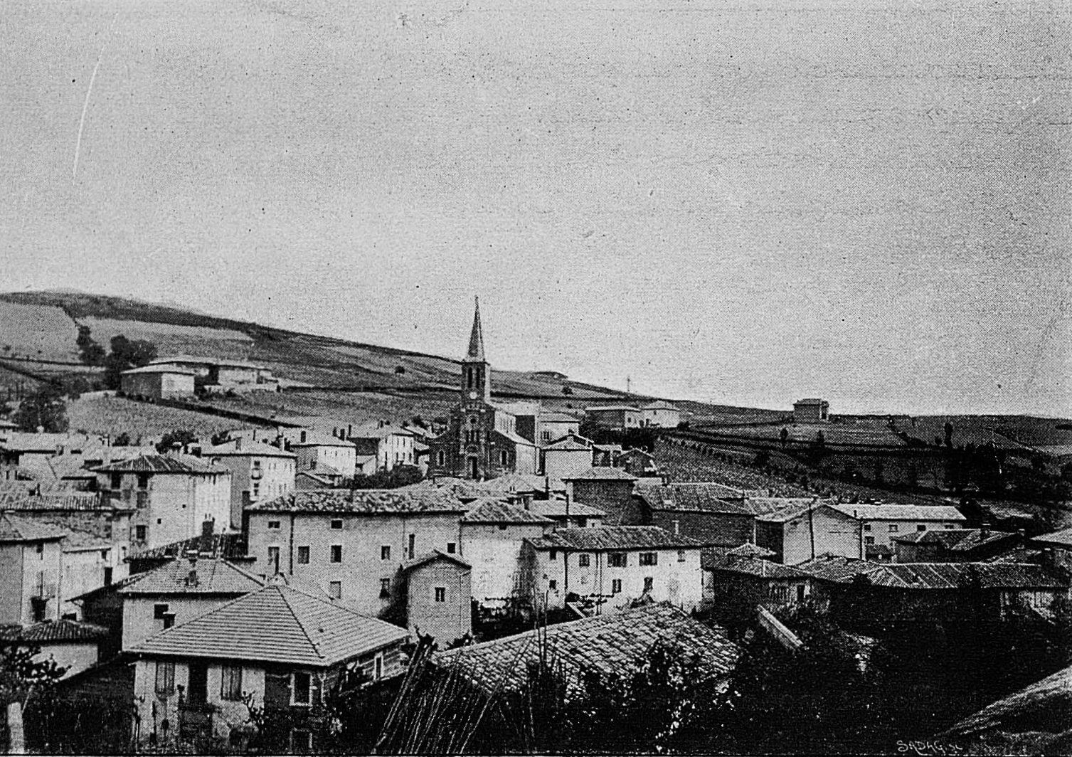 Dictionnaire illustré des communes du département du Rhône. Tome 1 / par MM. E. de Rolland et D. Clouzet.